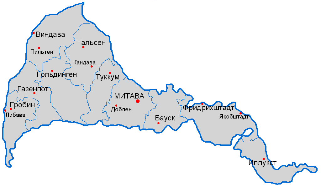 Административное деление Курляндской губернии